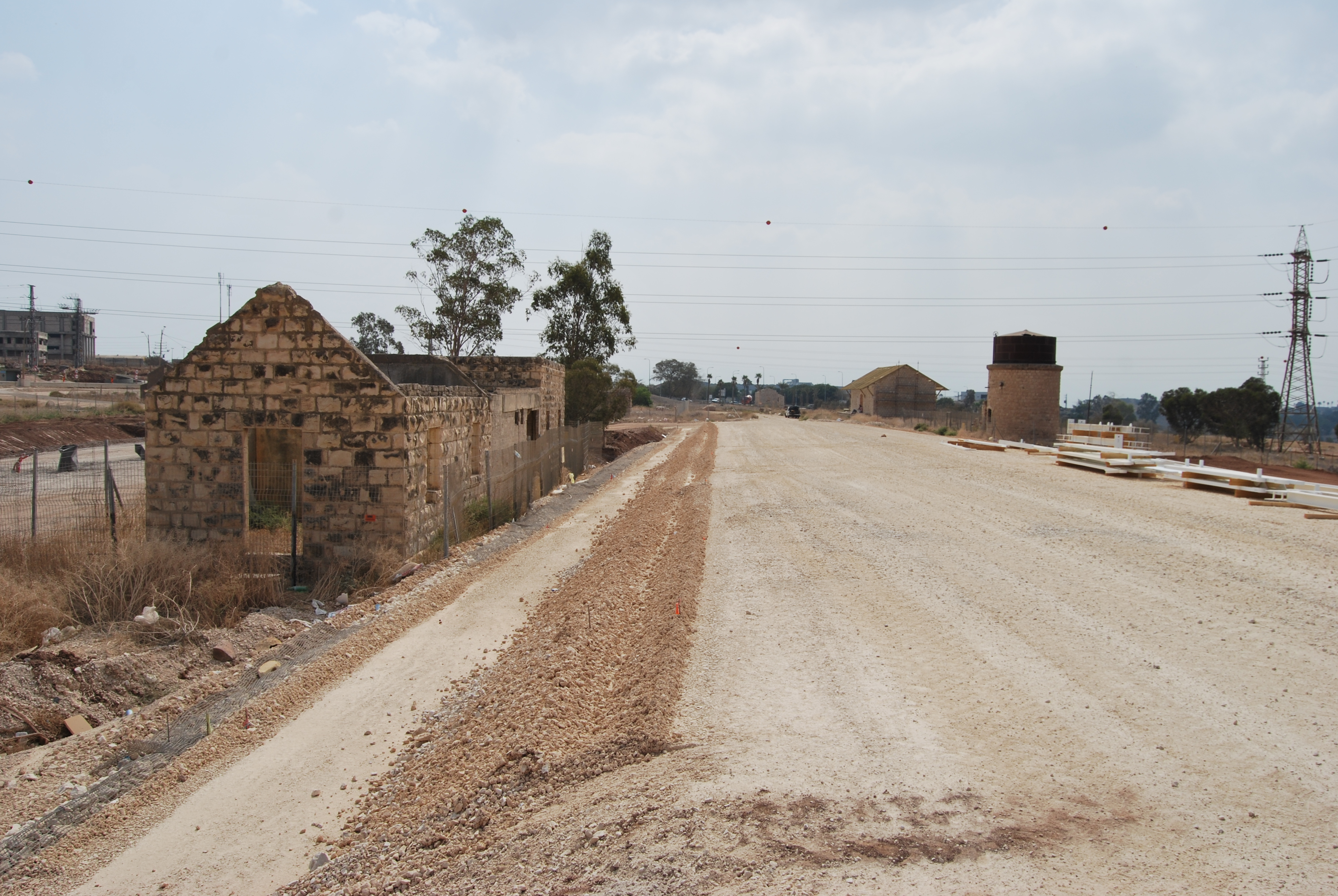 רבד חדש על הקו ההיסטורי בתחום תחנת בית שאן